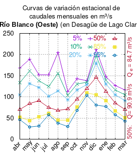 Curvas de variación estacional del río Blanco (Oeste) en desagüe del Lago Caro. # Dirección General de Aguas # Diagnóstico y clasificación de los cursos y cuerpos de agua según objetivos de calidad. Cuenca del río Aysén. # Santiago de Chile # Ministerio de Obras Públicas (Chile) # 2004 # url: # urlarchivo: # Tabla 4.10: Estación Blanco (oeste) en Desagüe de Lago Caro, pág. 58 mes 5% 10% 20% 50% 85% 95% abr 167.63 133.86 104.44 70.77 51.43 45.78 may 188.48 160.77 130.88 84.25 44.14 28.25 jun 152.01 138.65 122.47 91.54 53.45 31.07 jul 152.25 124.45 100.87 75.02 61.08 57.24 ago 204.80 155.40 113.75 68.46 44.37 37.82 sep 113.45 104.24 93.09 71.77 45.50 30.08 oct 142.88 129.62 115.80 94.93 76.38 67.97 nov 138.54 134.34 129.37 120.21 109.52 103.56 dic 211.66 197.16 179.58 146.00 104.63 80.34 ene 147.23 139.55 130.24 112.47 90.57 77.71 feb 126.59 115.96 104.27 85.11 66.28 57.22 mar 116.69 104.27 90.98 70.12 50.87 42.13 This plot was created with Gnuplot.